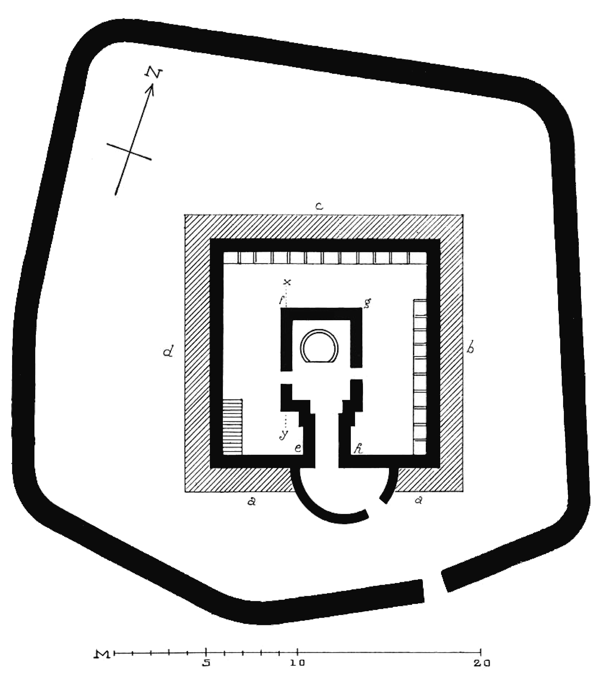 Plan des römischen Centenariums Tibubuci in der südtunesischen Wüste. Quelle: Paul Gauckler (1866–1911): Le Centenarius de Tibubuci (Ksar-Tarcine, Sud tunisien). In: Comptes-rendus des séances de l'Académie des Inscriptions et Belles-Lettres. 46/3. (1902). S. 321–340; hier S. 327.